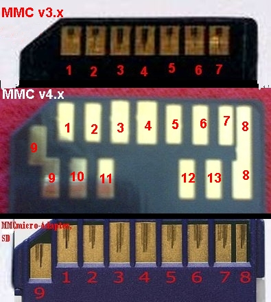 Vergleich der PINs MMC und SD